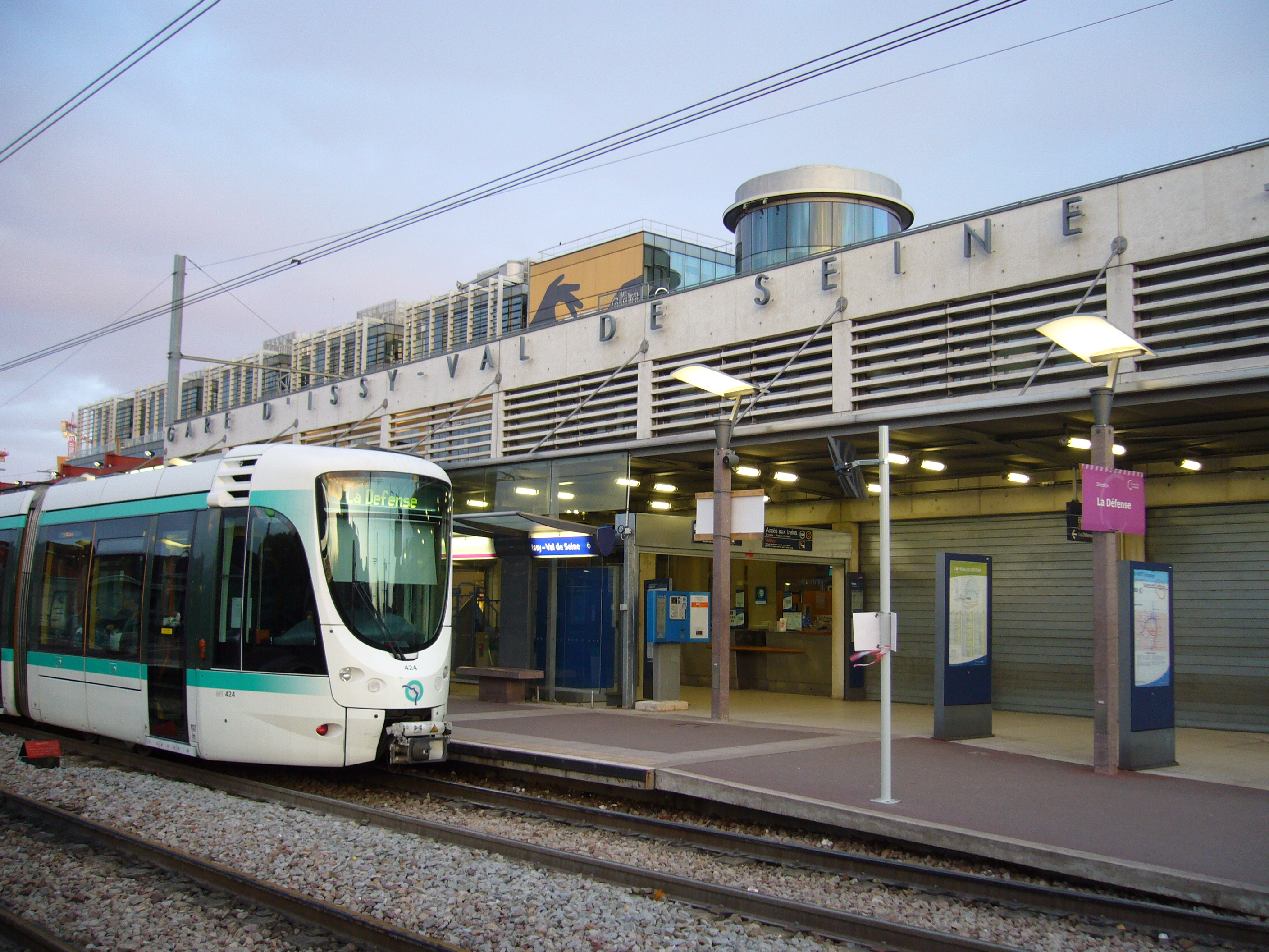 Un Citadis 302 à la station Issy Val de Seine sur la ligne 2 du tramway d'Île-de-France.